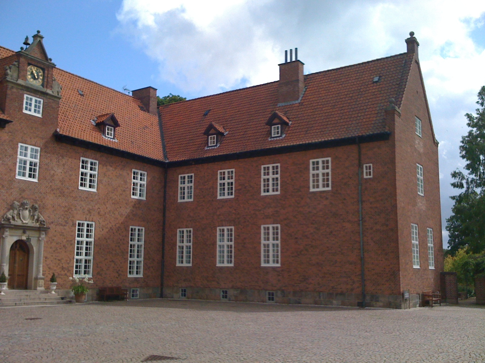 Egelund Slot between Hillerød and Fredensborg in Denmark